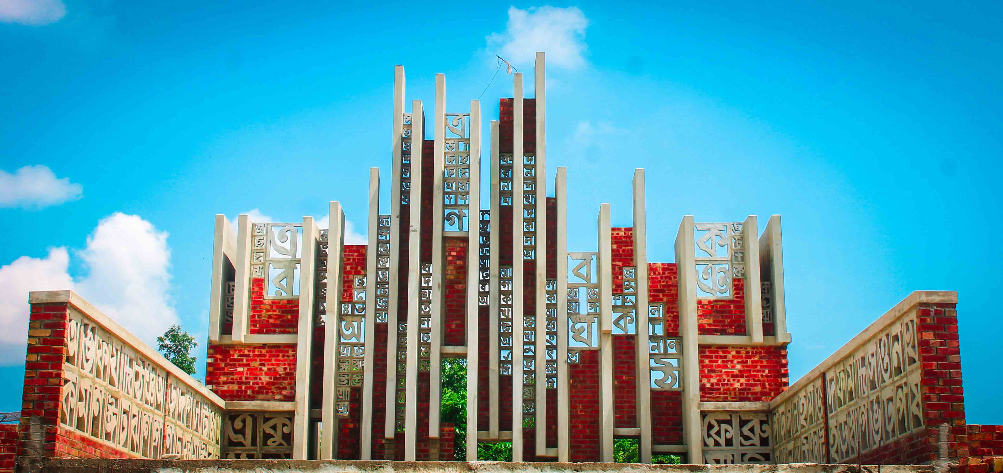 কেন্দ্রীয় শহীদ মিনার, সিলেট কৃষি বিশ্ববিদ্যালয়।